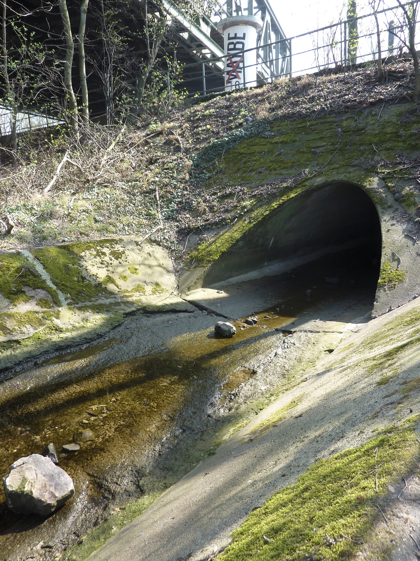 Der Königsbach, im Volksmund auch Luderbach genannt, ist ein 13,7 km langer linker (südlicher) Zufluss des Flusses Main im deutschen Bundesland Hessen. Der Bach entspringt östlich der Stadt Dreieich im Landkreis Offenbach, durchfließt das Stadtgebiet von Neu-Isenburg sowie den Frankfurter Stadtwald und den dort befindlichen Jacobiweiher. Er mündet verrohrt im Stadtteil Niederrad der Stadt Frankfurt am Main. Das Foto zeigt die Mündung; am oberen Bildrand die Straße Niederräder Ufer sowie die Eisenbahnbrücke Main-Neckar-Brücke. Blick nach Südosten